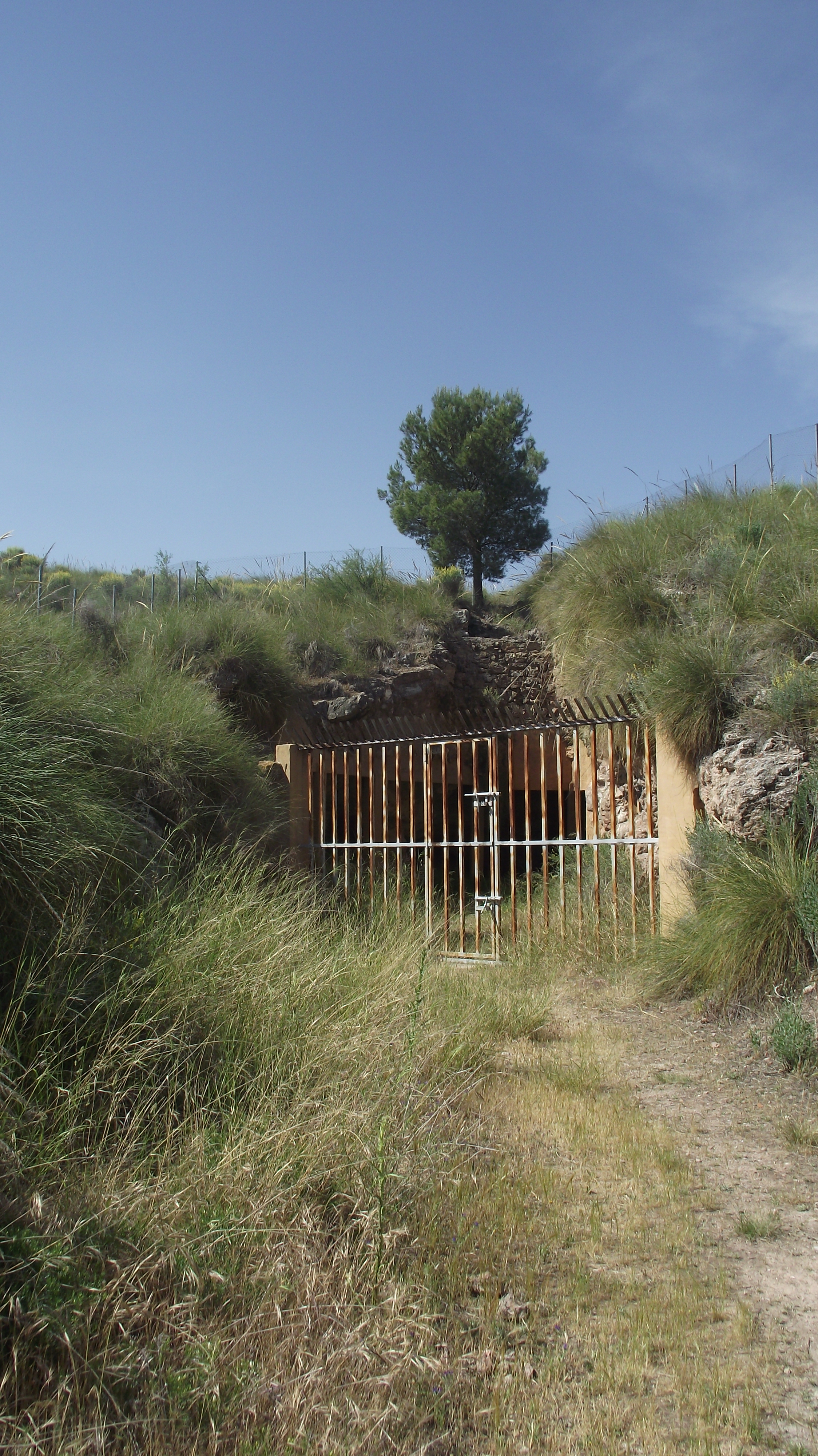 Entrada de la mina La Celia, Murcia, España